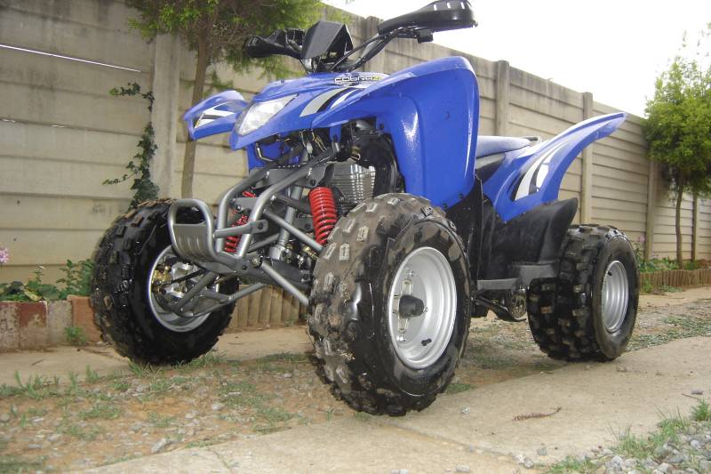 Aeon Cobra 220 ATV Quad bike